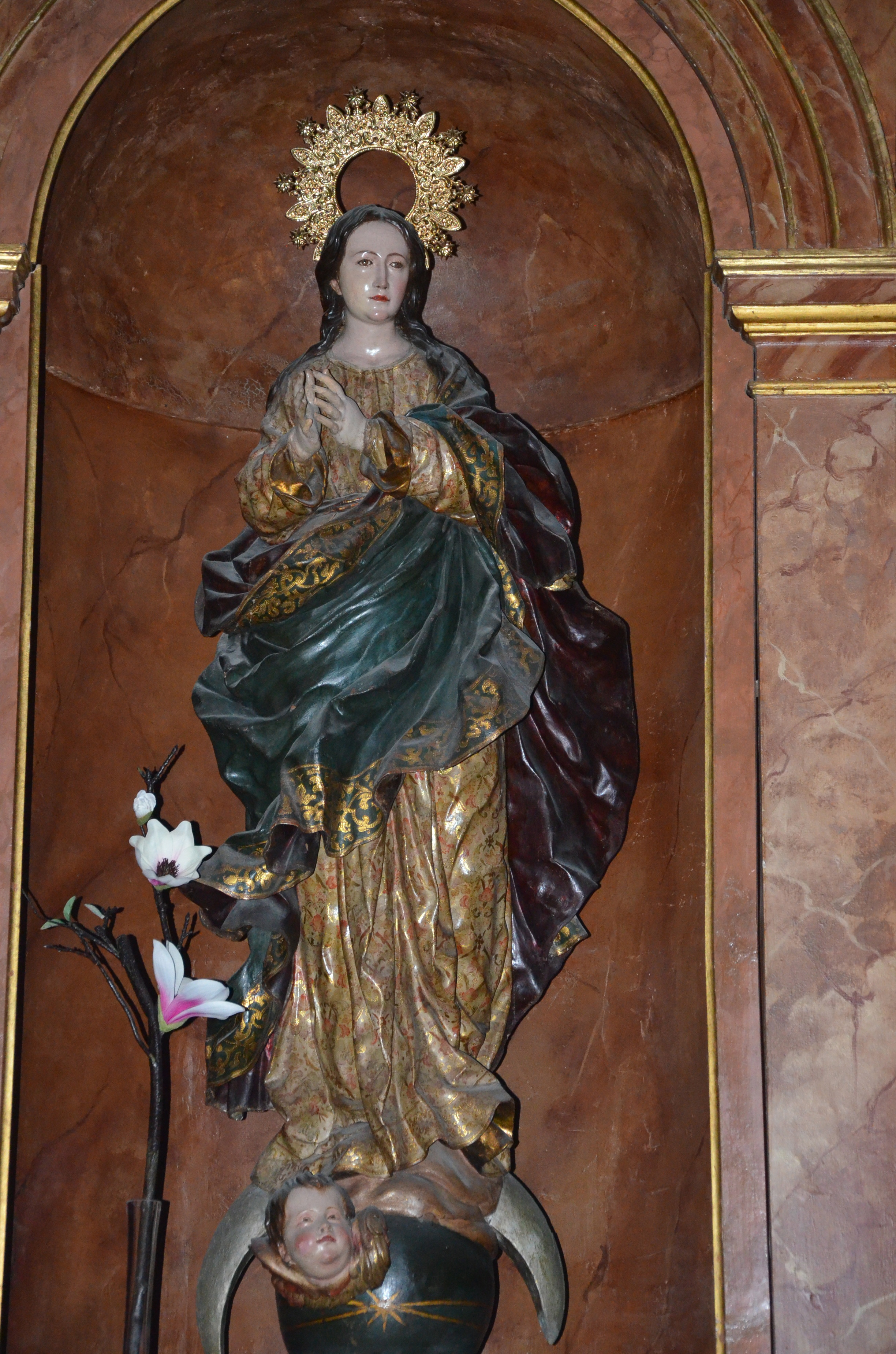 Talla de la Inmaculada Concepción que se conserva en la iglesia de Nª Sª de Gracia de los Trinitarios en Córdoba, Realizada por Pedro Roldán